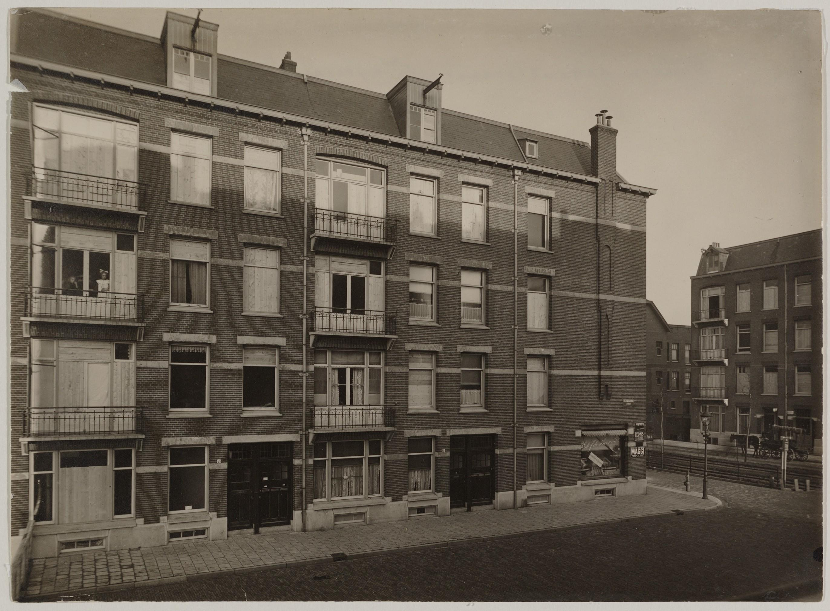 Beschrijving Roelantstraat 1-4 (v.l.n.r.) (voorheen Willem Barentszstraat) hoek Admiraal De Ruijterweg (rechts) Documenttype foto Vervaardiger Onbekend Anoniem Collectie Collectie Stadsarchief Amsterdam: foto-afdrukken Datering 1930 Geografische naam Roelantstraat Admiraal De Ruijterweg Inventarissen Afbeeldingsbestand OSIM00004002223